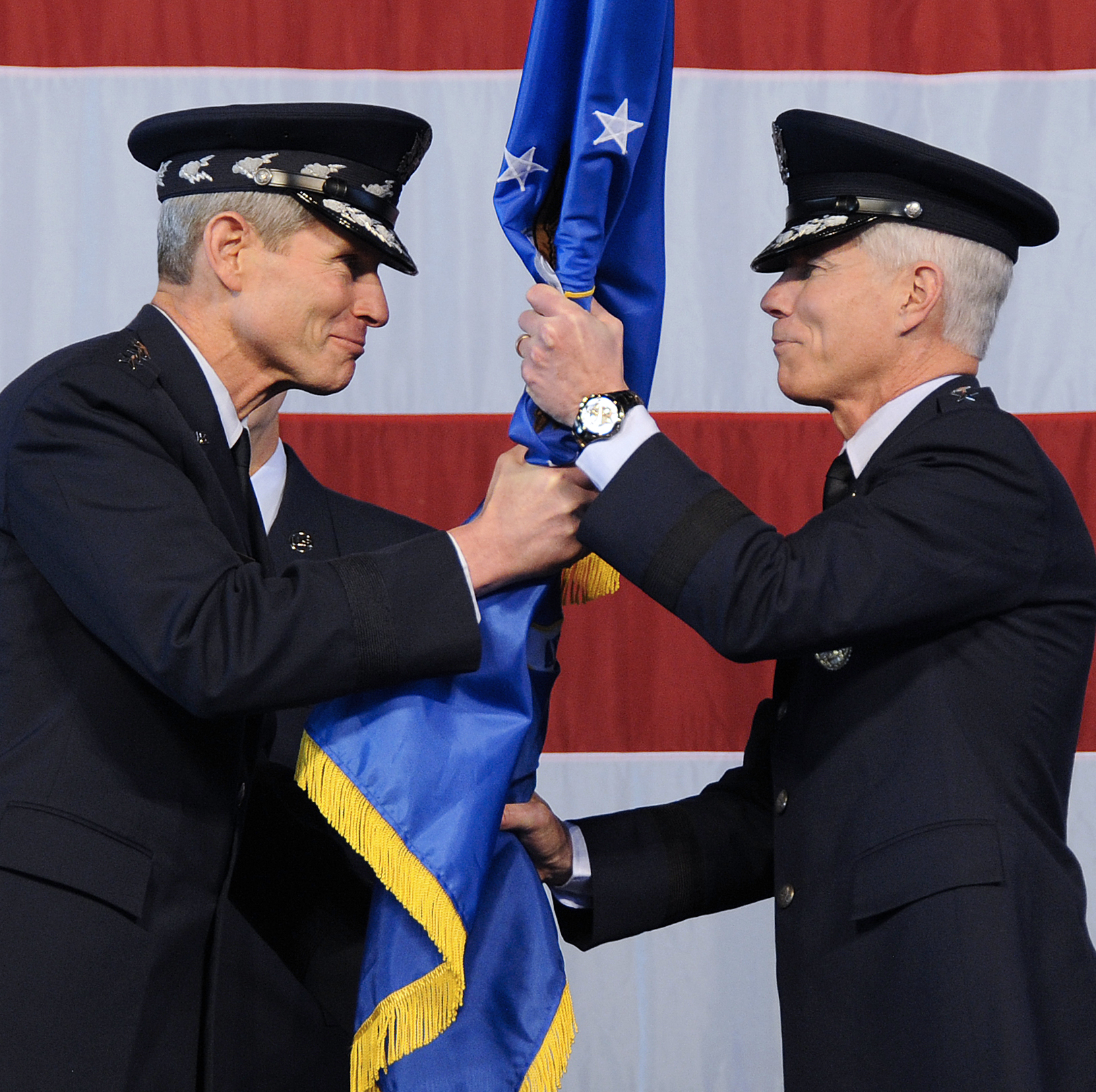 Norton A. Schwartz & William L. Shelton, Change of Command Air Force Space Command, January 5th 2011